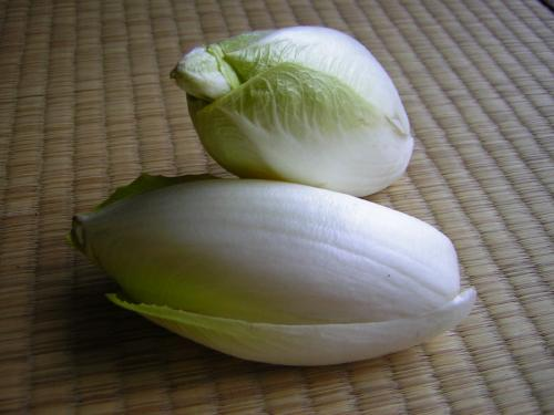 Endivien